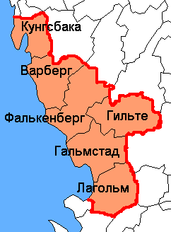 Карта адміністративного поділу лену Галланд у Швеції. Карту створено на основі карти File:Halland County.png.